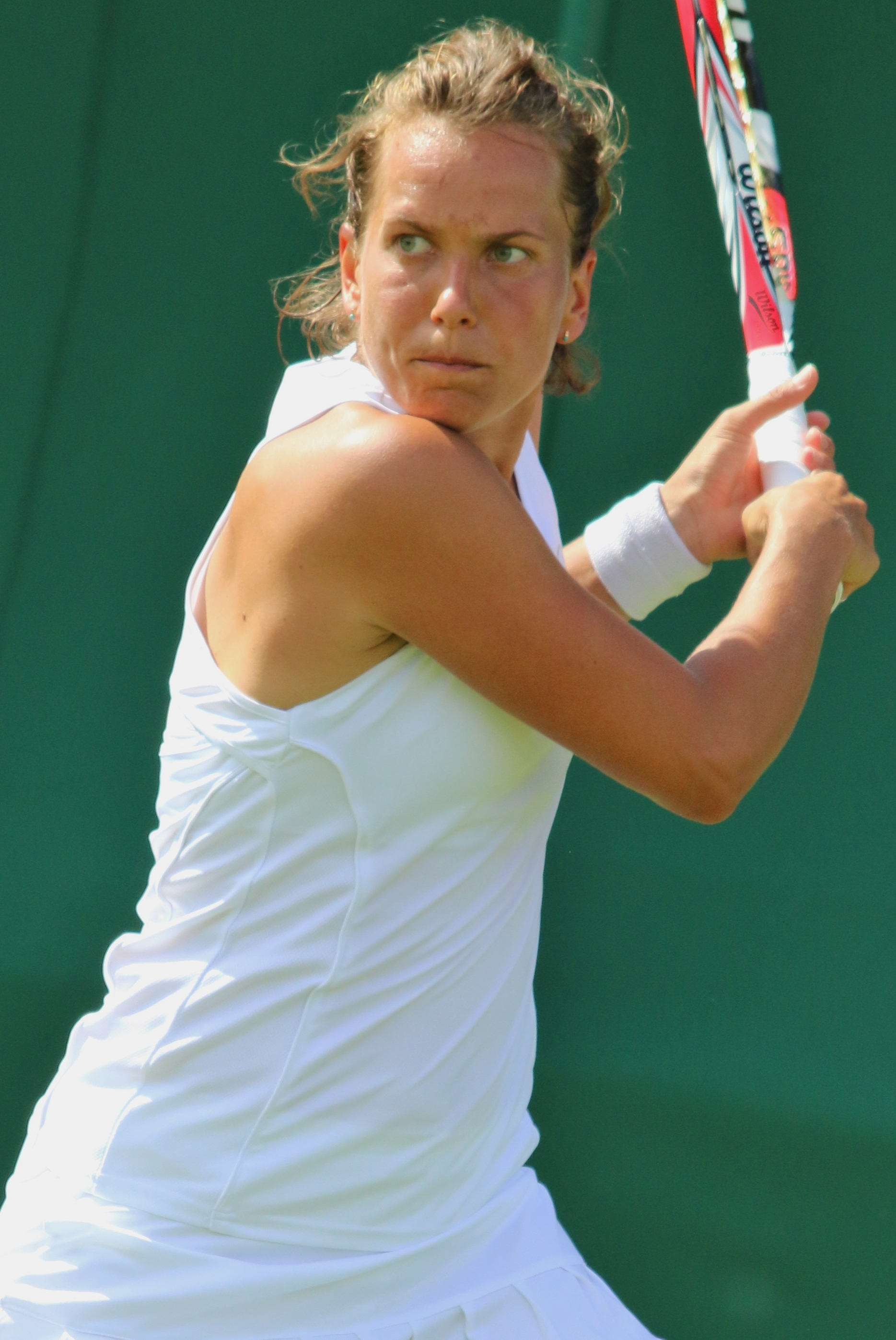 Strycova WM17 (5)